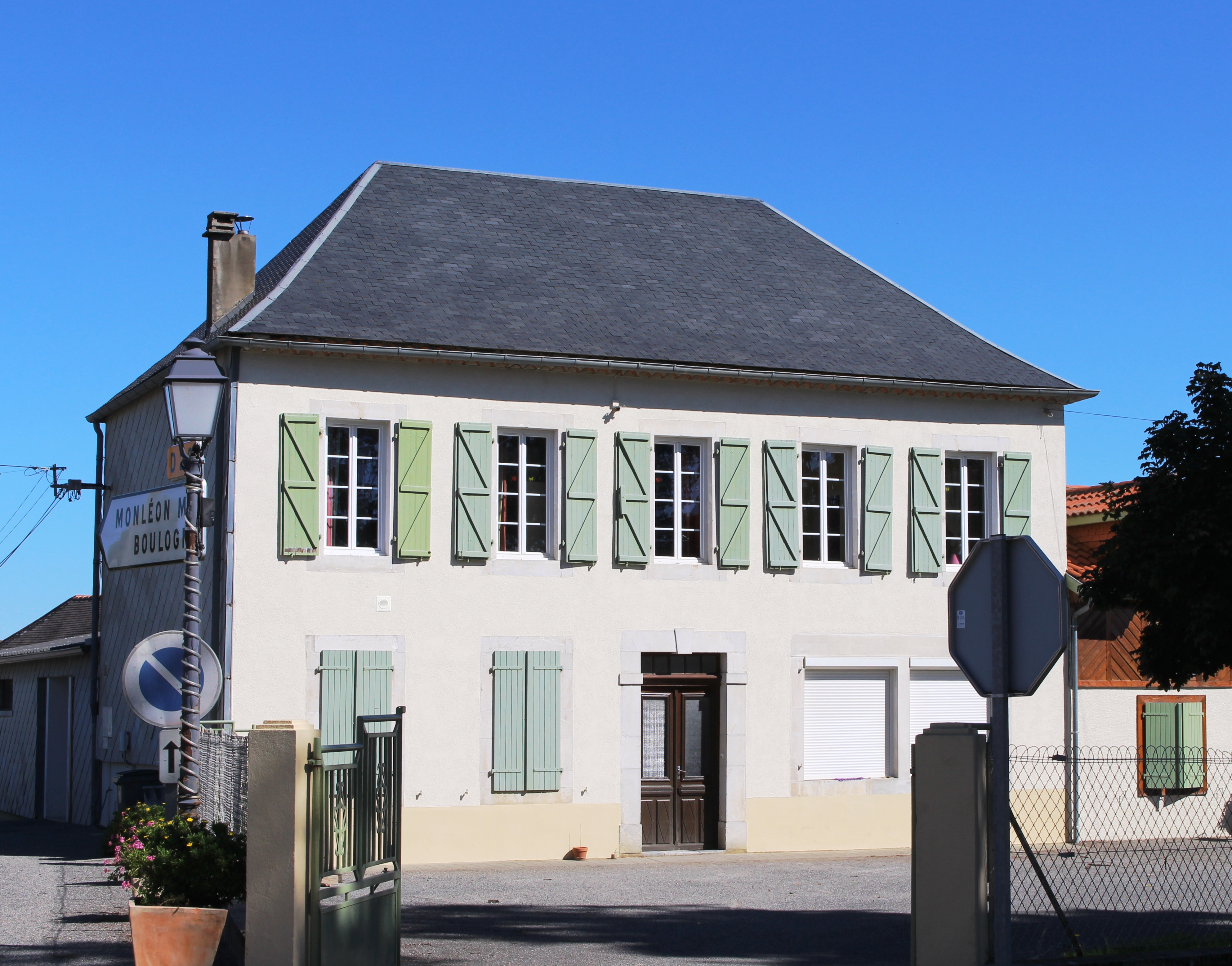 École de Recurt (Hautes-Pyrénées)